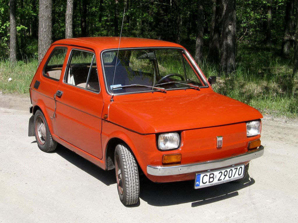 Polski Fiat 126p rocznik 1973 w rękach bydgoskiego kolekcjonera.